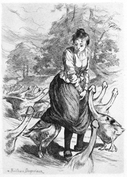 à Boileau Despreaux Dessins de Martin van Maele. Illustration de La Grande Danse macabre des vifs, 1905.